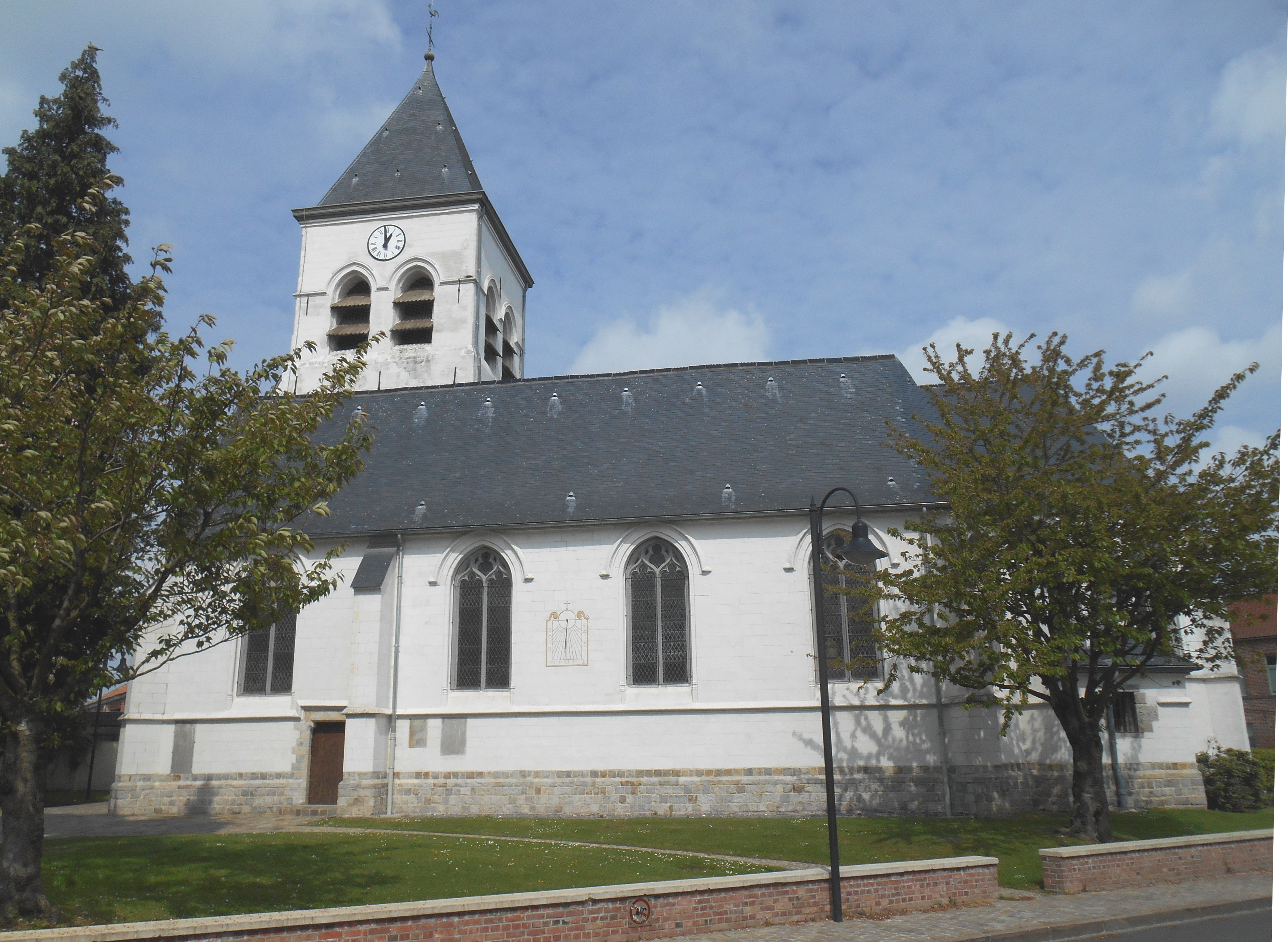 L'Eglise de Péronne-en-Mélantois